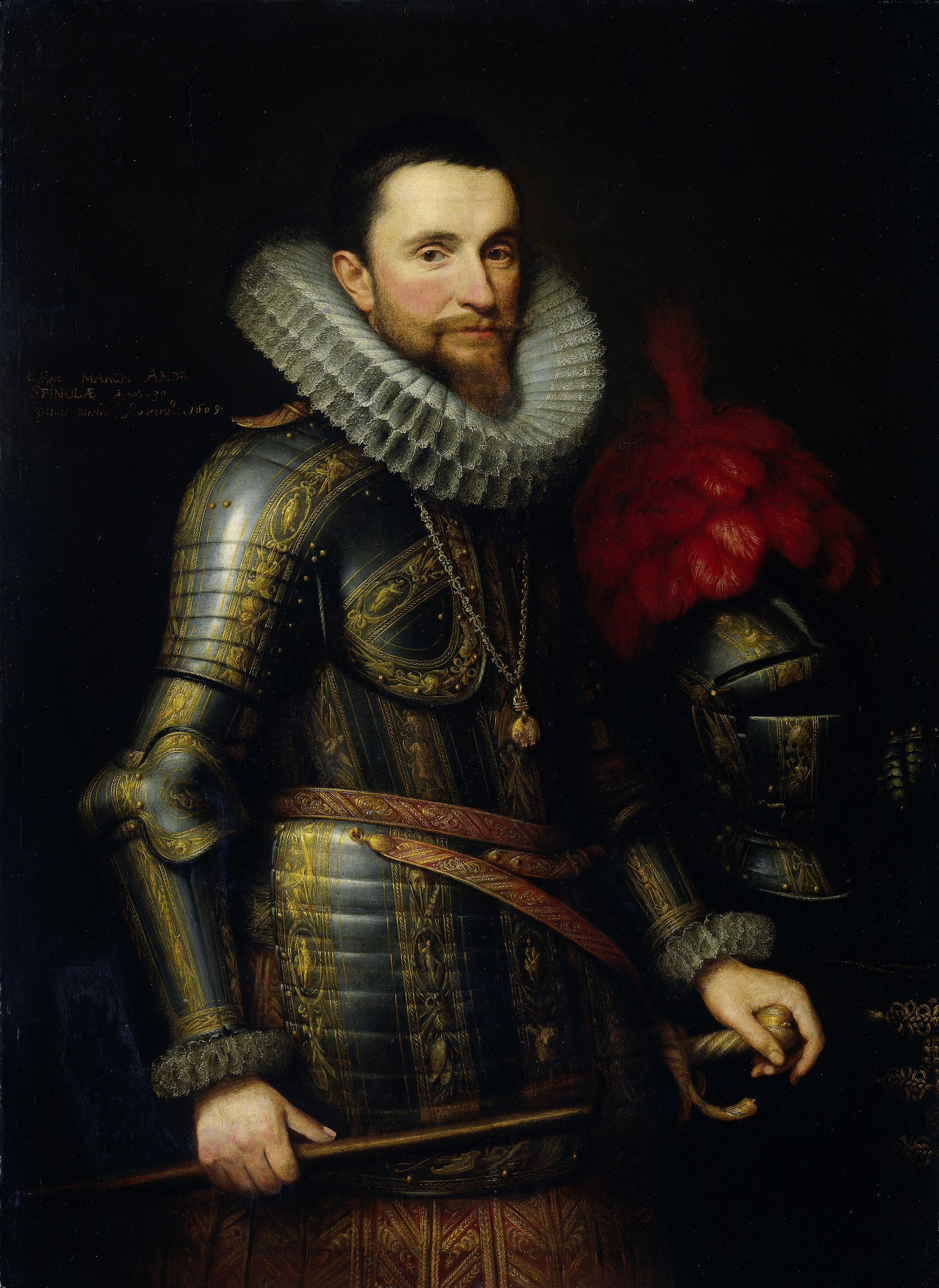 Portret van Ambrogio Spinola, opperbevelhebber der Spaanse troepen in de Zuidelijke Nederlanden. Heupstuk, staande in wapenrusting bij een tafel waarop de helm met pluimen staat. Commandostaf in de rechterhand, de linkerhand op het gevest van zijn degen. Aan een ketting om de hals het embleem van de Orde van het Gulden Vlies.